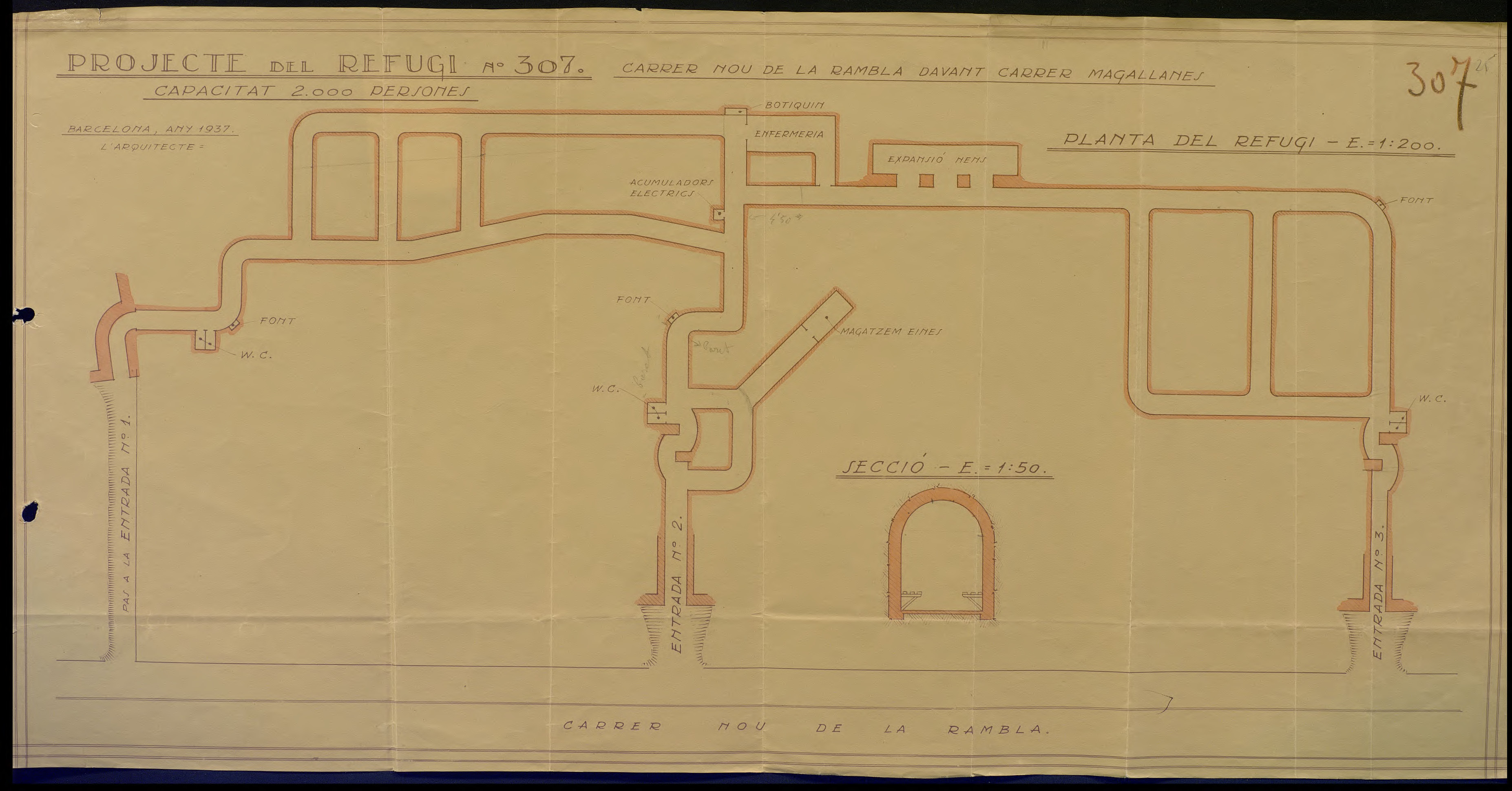 Plànol del refugi 307 del carrer Nou de la Rambla 179